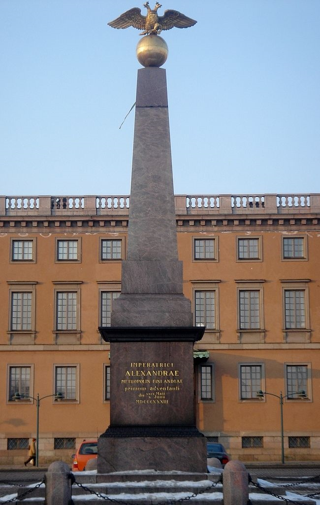 Keisarinnankivi Helsingin kauppatorilla